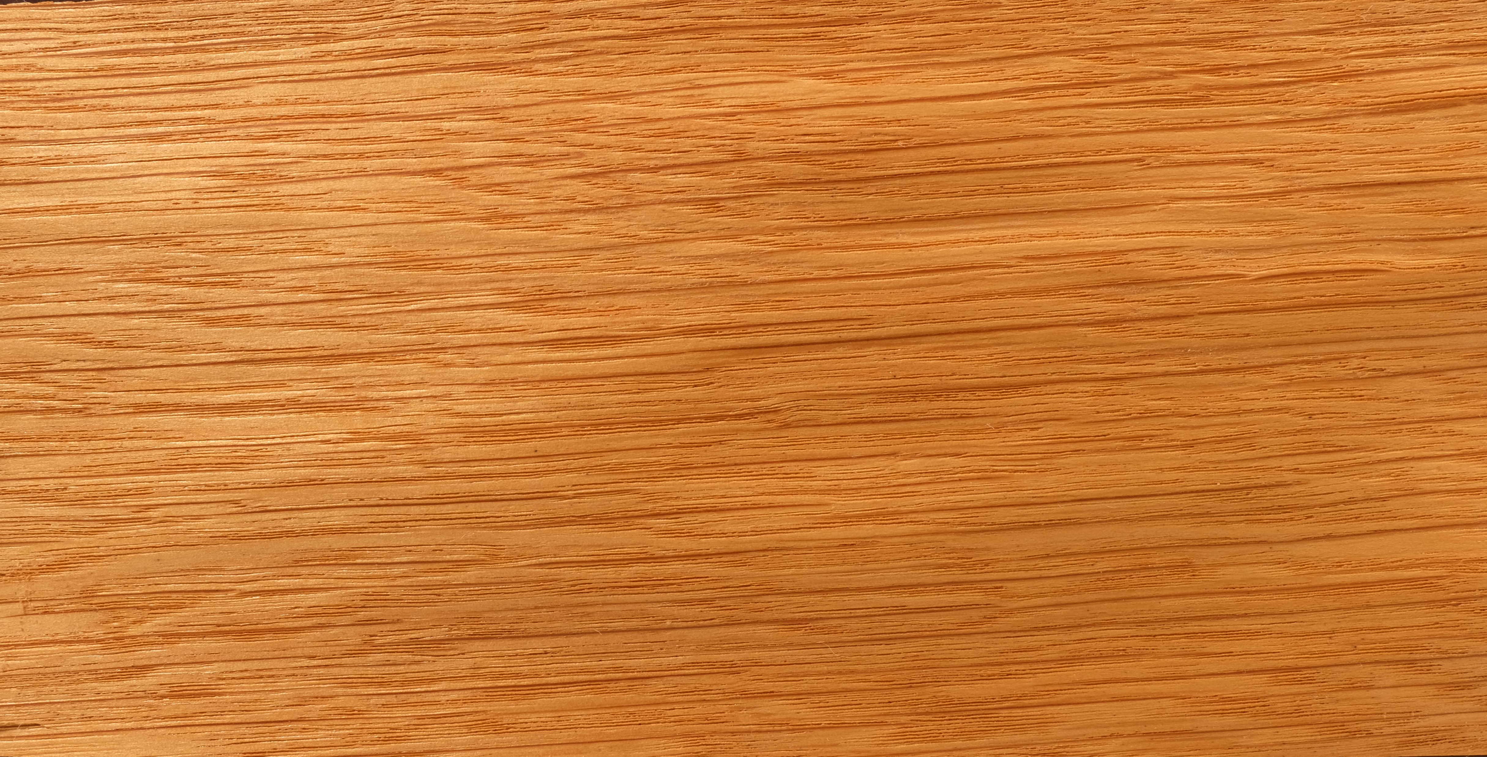 Gemessertes Furnier der Traubeneiche, geölt, nicht geschliffen